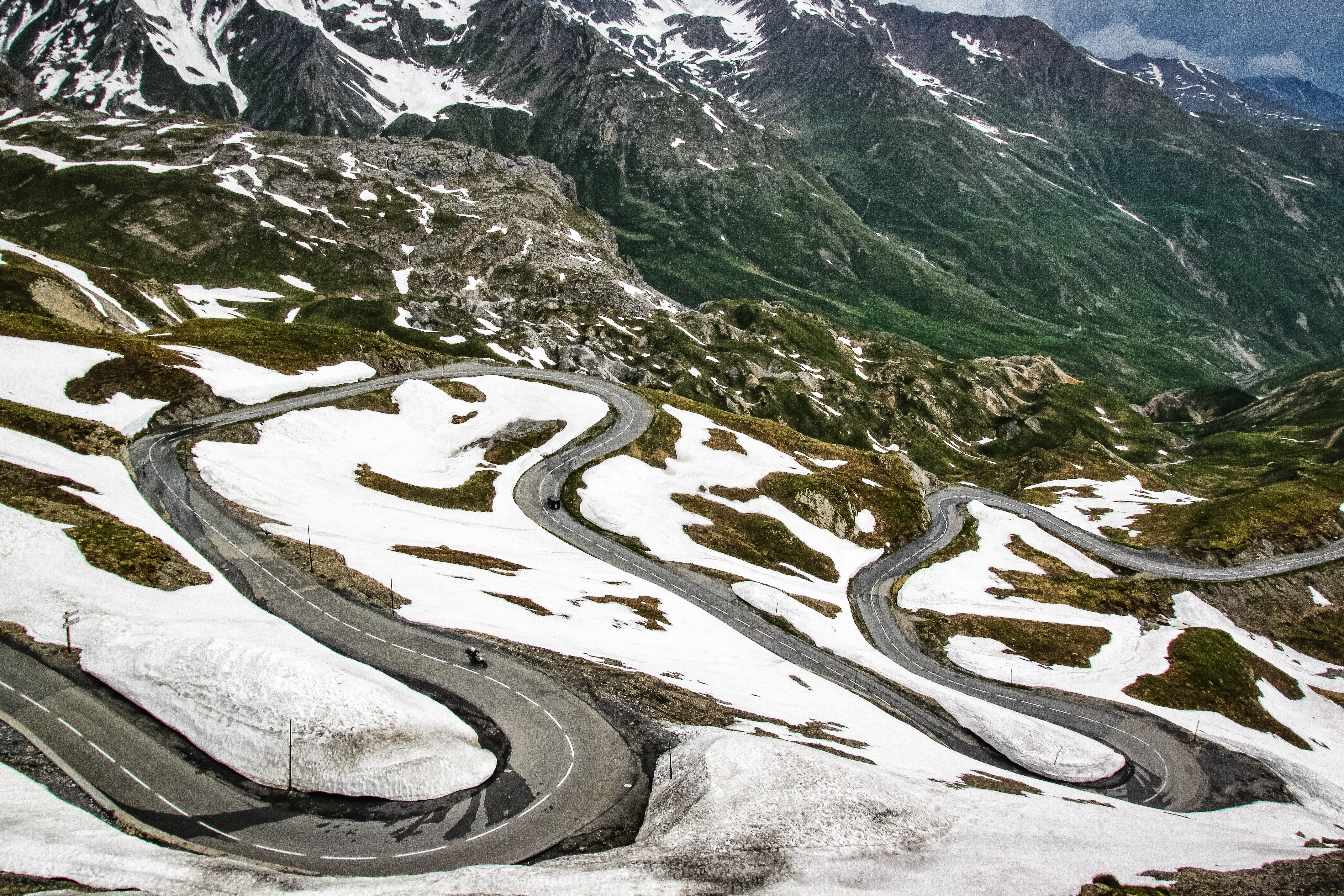 Col du Galibier, France